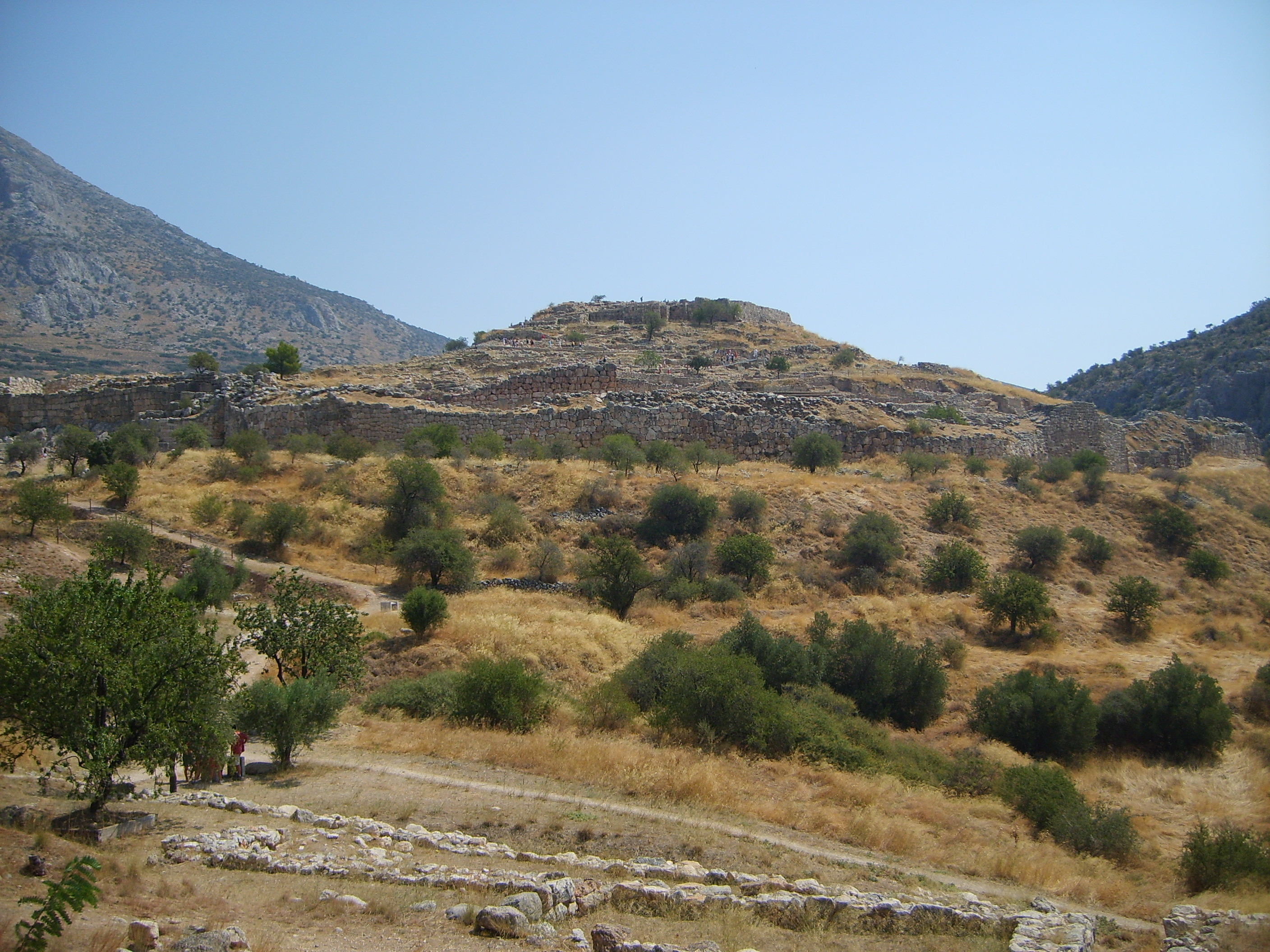 Vue large des ruines de la cité de Mycènes (Grèce)